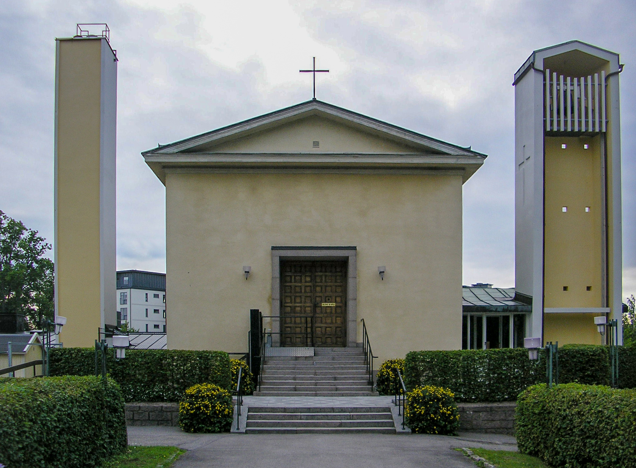 Trons kapell är ett kapellkrematorium i Vänersborg. Det invigdes 1931. Kyrkogården runt kapellet, från 1808, är stadens äldsta bevarade separata begravningsplats sedan man flyttat staden till dess nuvarande läge